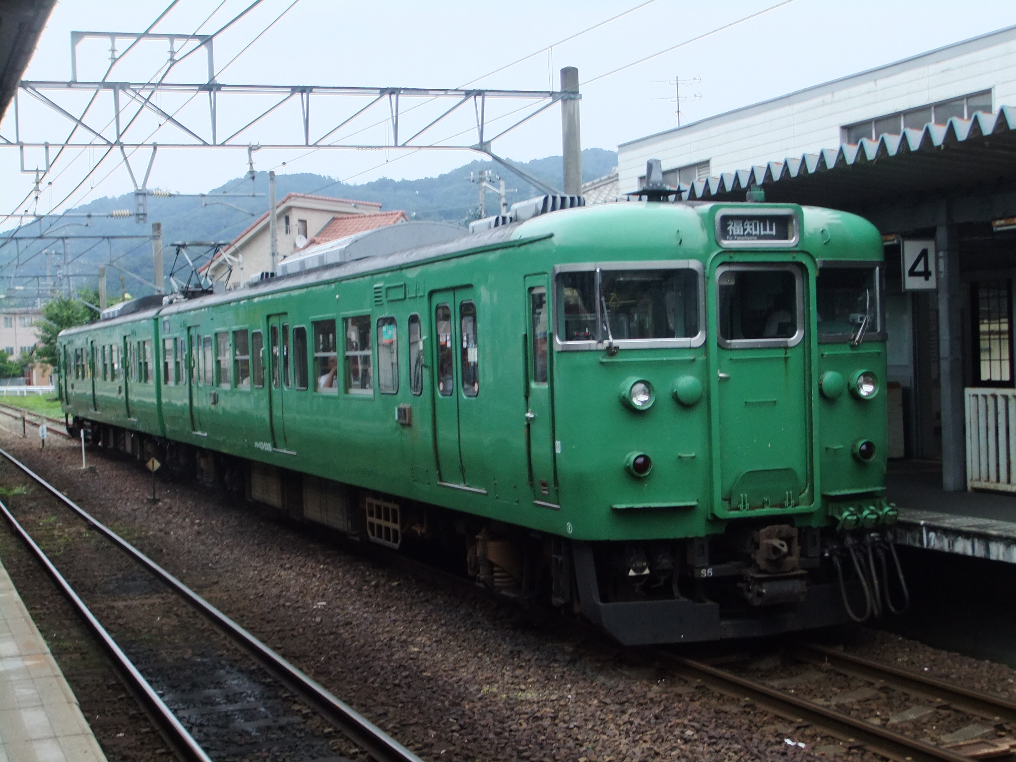 京都丹後鉄道 宮津駅に乗り入れるJR西日本 113系5300番台